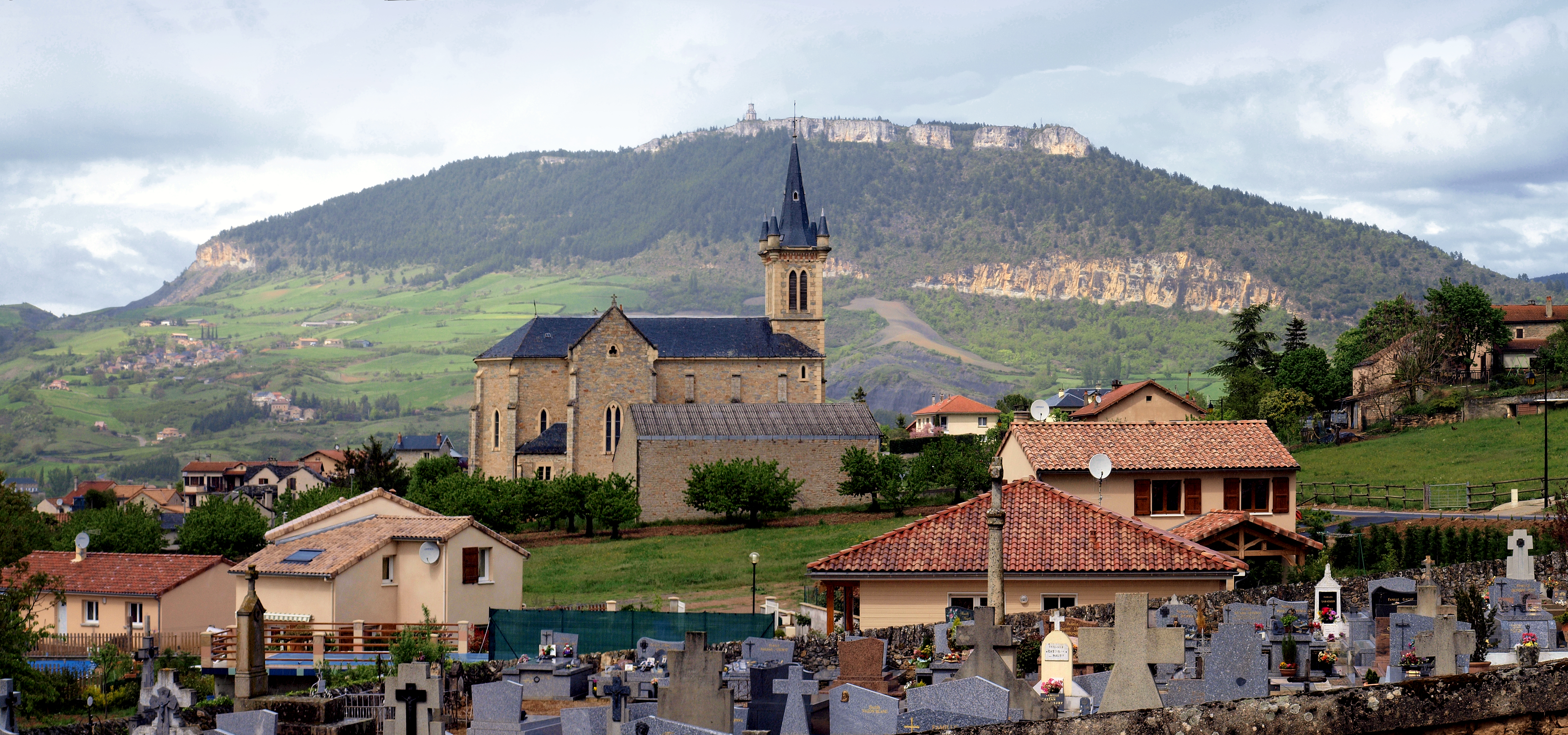 La Cresse (Aveyron) - Panorama